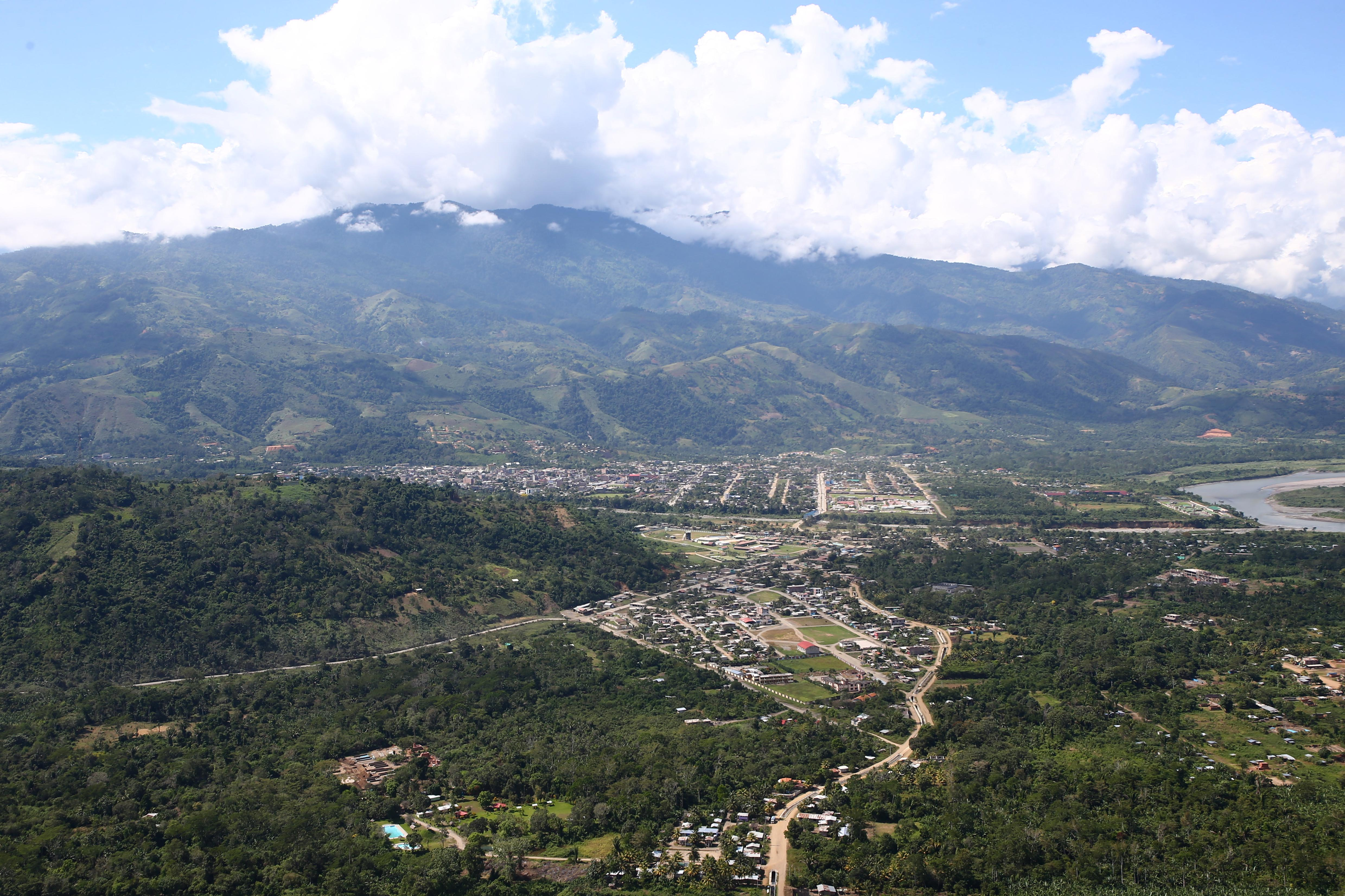 El pueblo de Pichaci, en Cuzco, Perú.